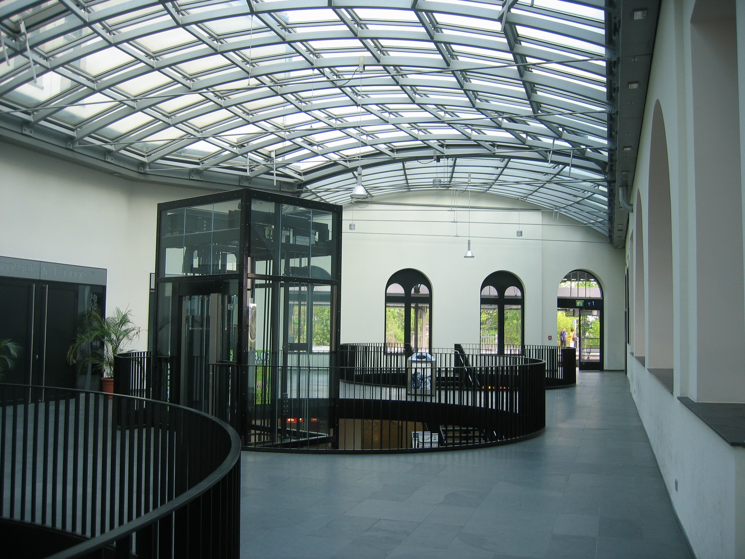 Bahnhof Hameln, Empfangsgebäude (innen)